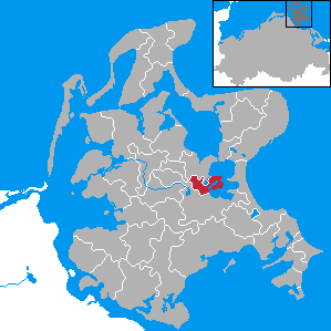 Buschvitz, Landkreis Rügen, Mecklenburg-Vorpommern